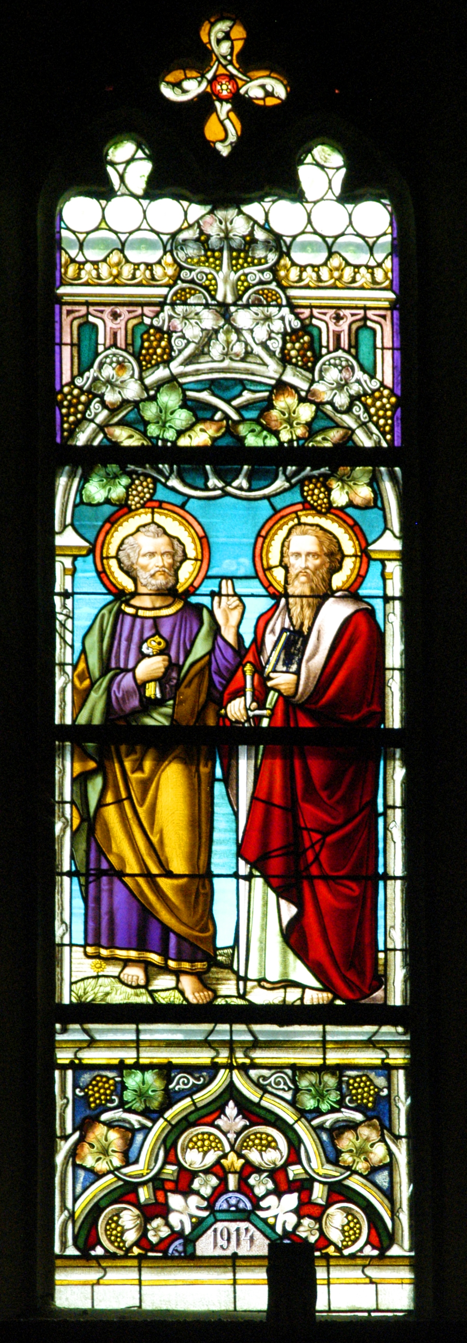 Kath. Pfarrkirche hll. Peter und Paul Apsisfenster mitte